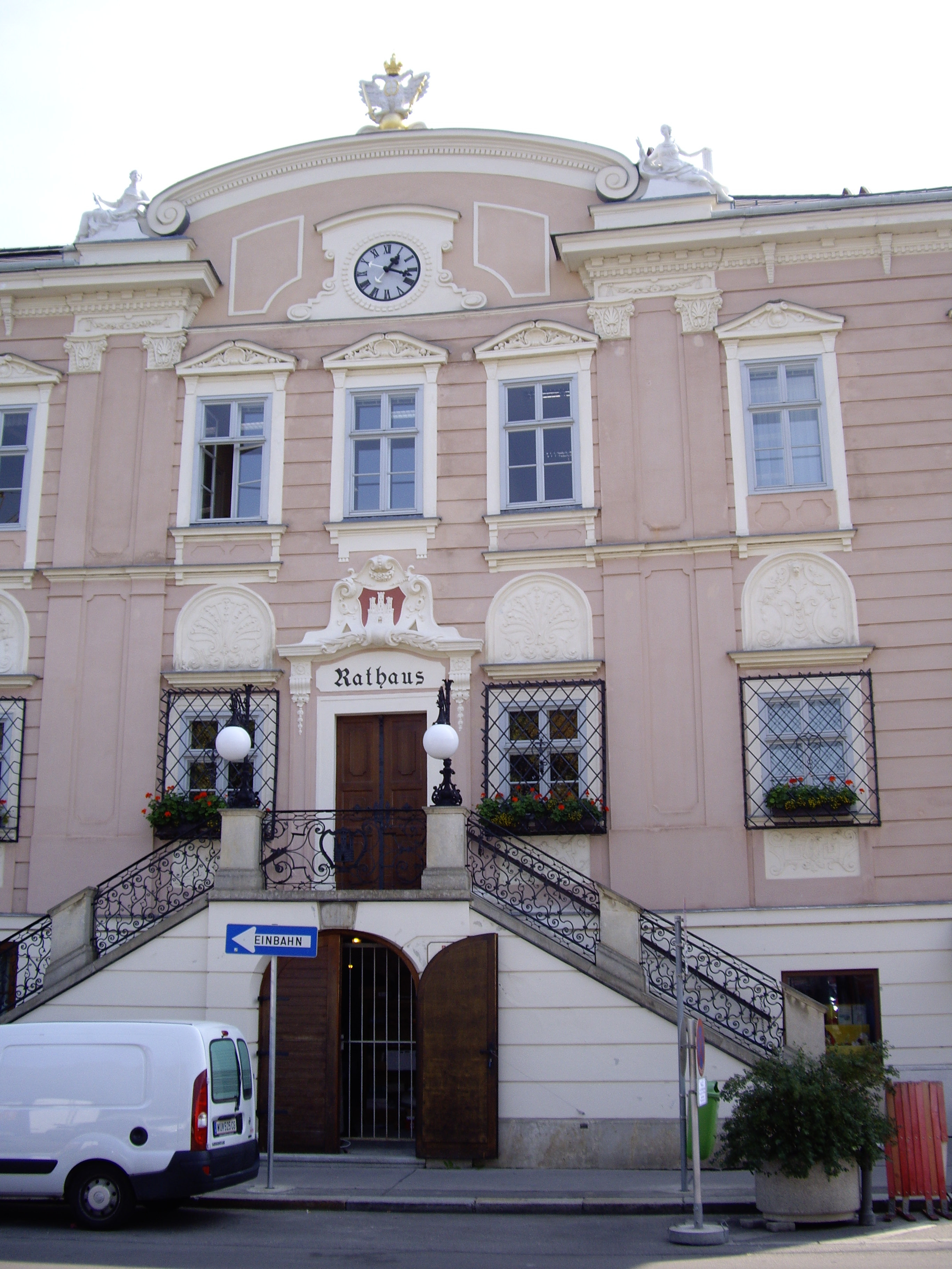 Malnova parto de la urbodomo de la urbokomunumo Klostronovburgo.